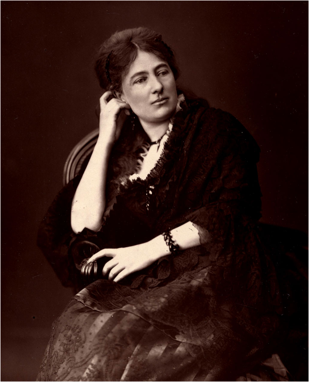 juliette adam en 1880